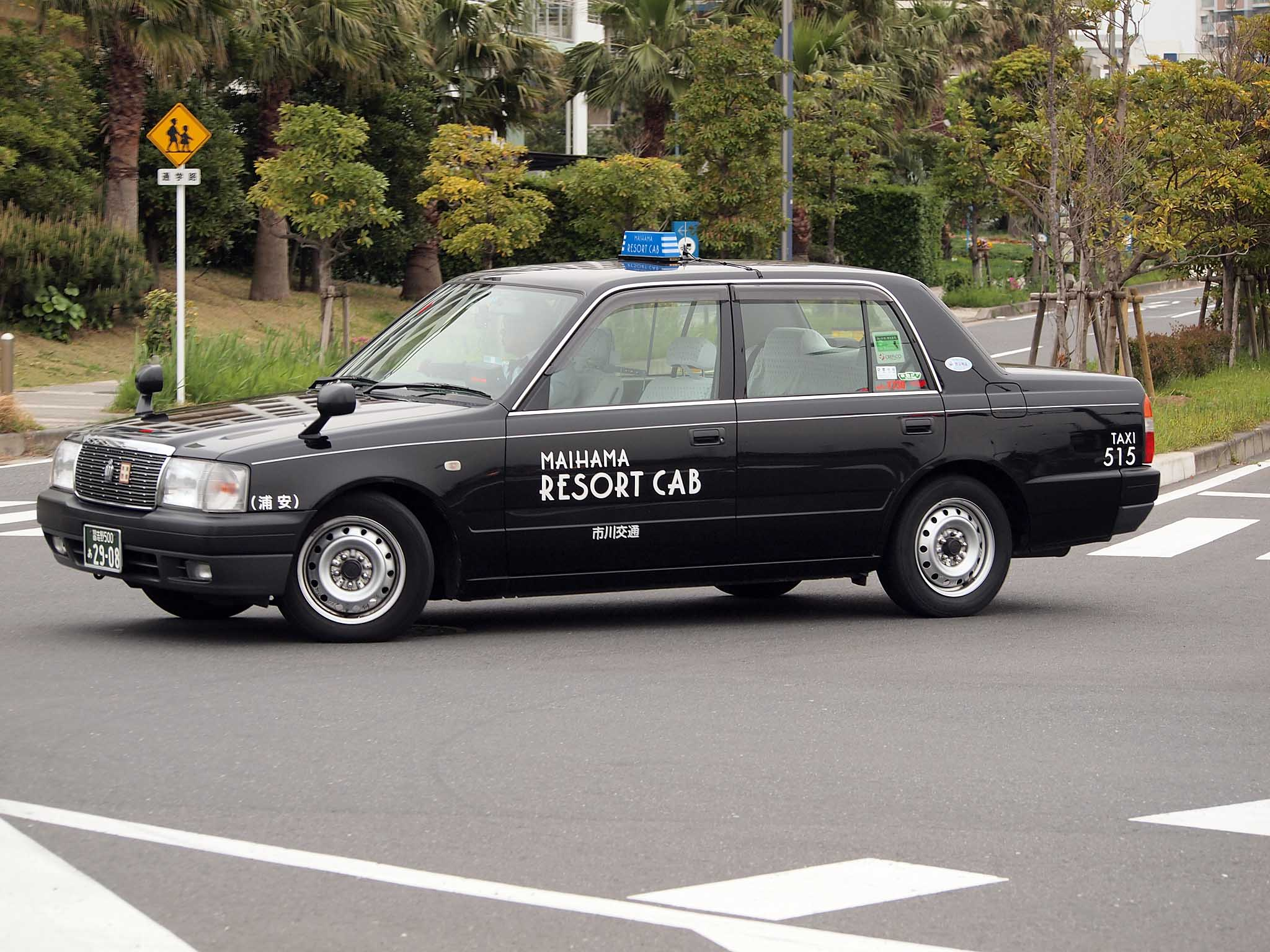 市川交通自動車のタクシーのうち、浦安営業所所属車は舞浜リゾートキャブと同様の外装で揃えられる。 登録番号：習志野500あ2908 撮影地：千葉県浦安市日の出